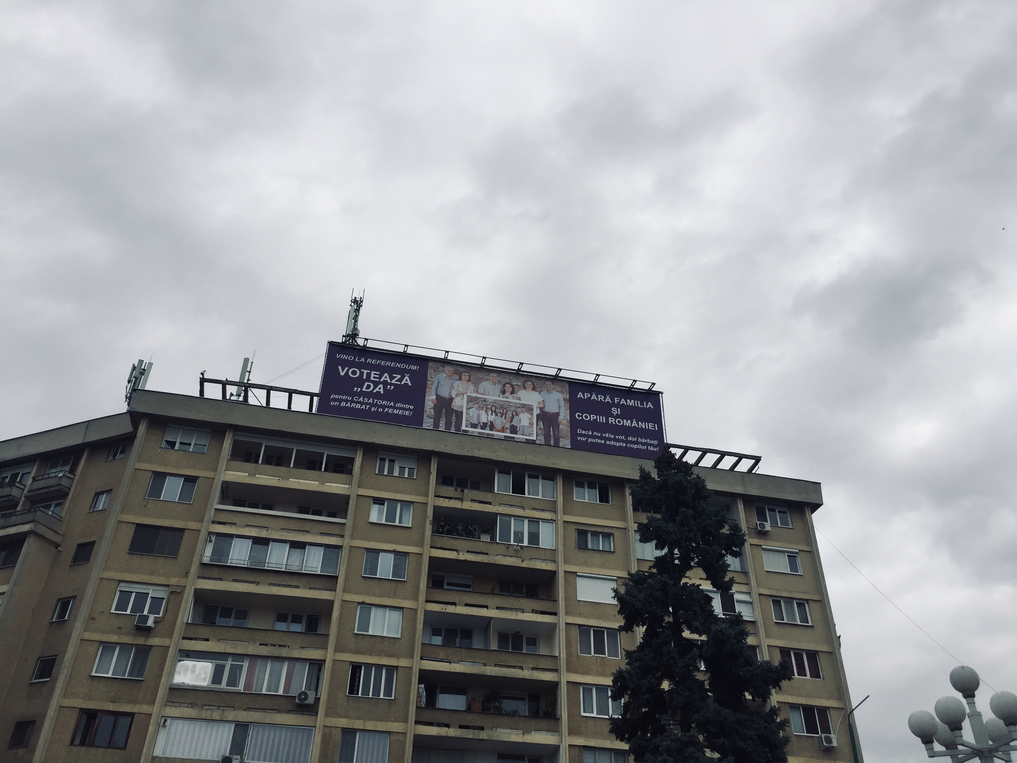 Panou cu mesaje pro-referendumul pentru familia traditionala in Timisoara